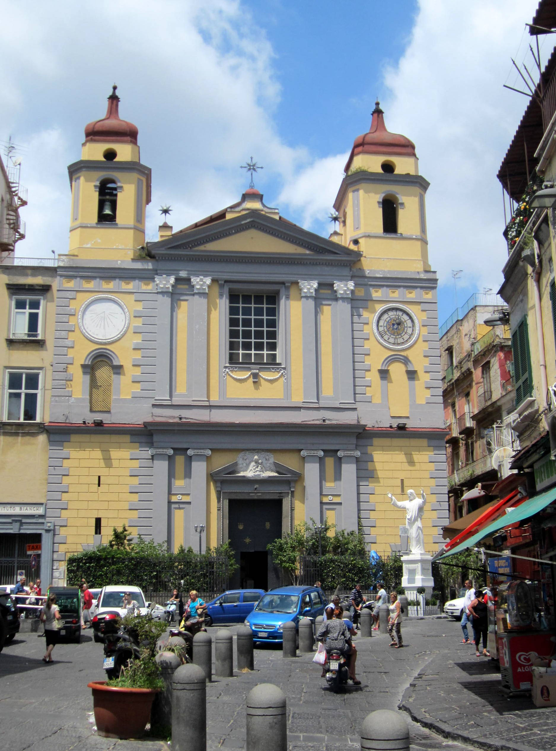 Chiesa di Santa Maria di Montesanto a Napoli